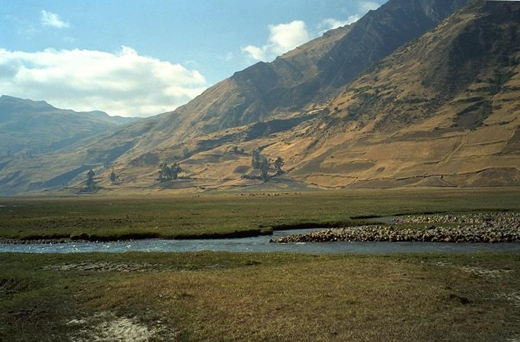 Nacimiento del rio Limari